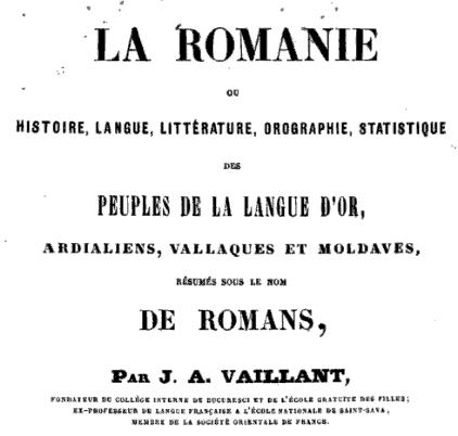 Front page of J. A. Vaillant's La Roumanie